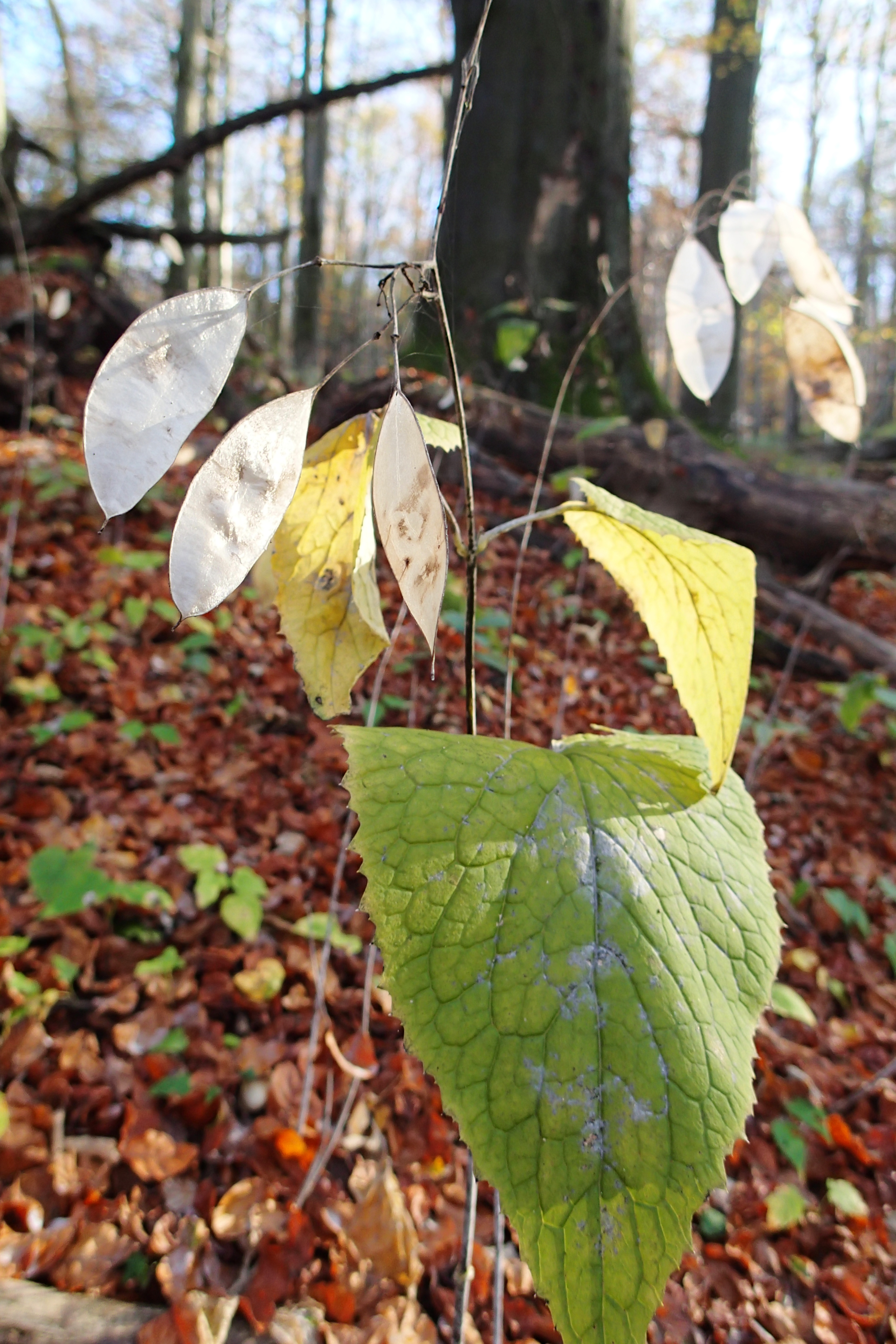 Měsíčnice vytrvalá na svahu Kokšína